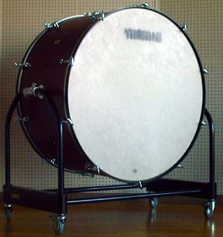 撮影者：User:っ